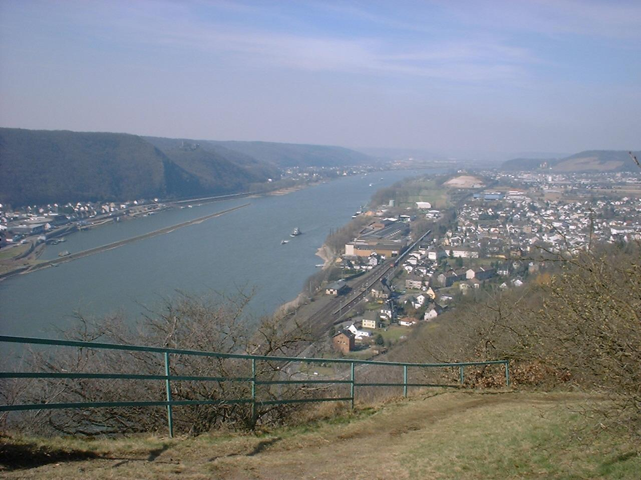 Blick von der Rheinbrohler Ley auf Rheinbrohl und Bad Hönningen (inkl. Schloss Arenfels), gegenüber der Hafen von Brohl-Lützing, Burg Rheineck und Bad Breisig.